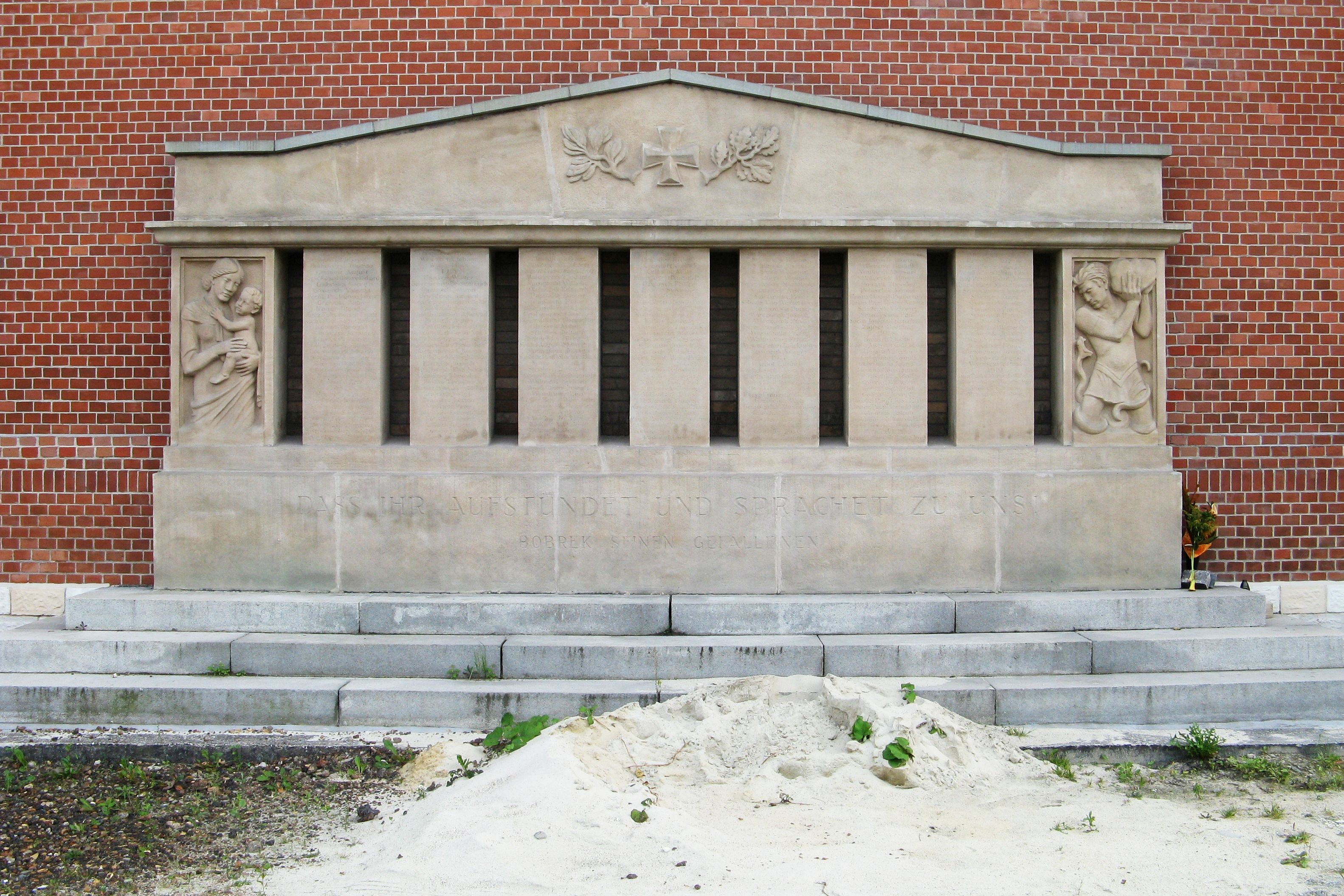 Pomnik pamięci mieszkańców Bobrka, poległych i zaginionych podczas I wojny światowej, na północnej elewacji kościoła św. Rodziny w Bytomiu-Bobrku. Wykonany z piaskowca z Gór Stołowych, powstał w pracowni kamieniarskiej Wilhelma Rose z Gliwic, odsłonięty 21 czerwca 1925 roku. „Na siedmiu kamiennych tablicach umieszczonych zostało około 280 nazwisk, a całość ozdobiono płaskorzeźbami autorstwa rzeźbiarza Ernsta Neumeistera ze Stuttgartu, przedstawiającymi kobietę z dzieckiem oraz mężczyznę dźwigającego głaz i walczącego z wężem. Ponad wszystkim góruje Żelazny Krzyż z gałązka drzewa oliwkowego i gałązką dębu. Poniżej, na cokole, wyryto niemiecki napis: "Dass Ihr aufständet und sprächet zu uns! Bobrek seinen Gefallenen".” (źródło